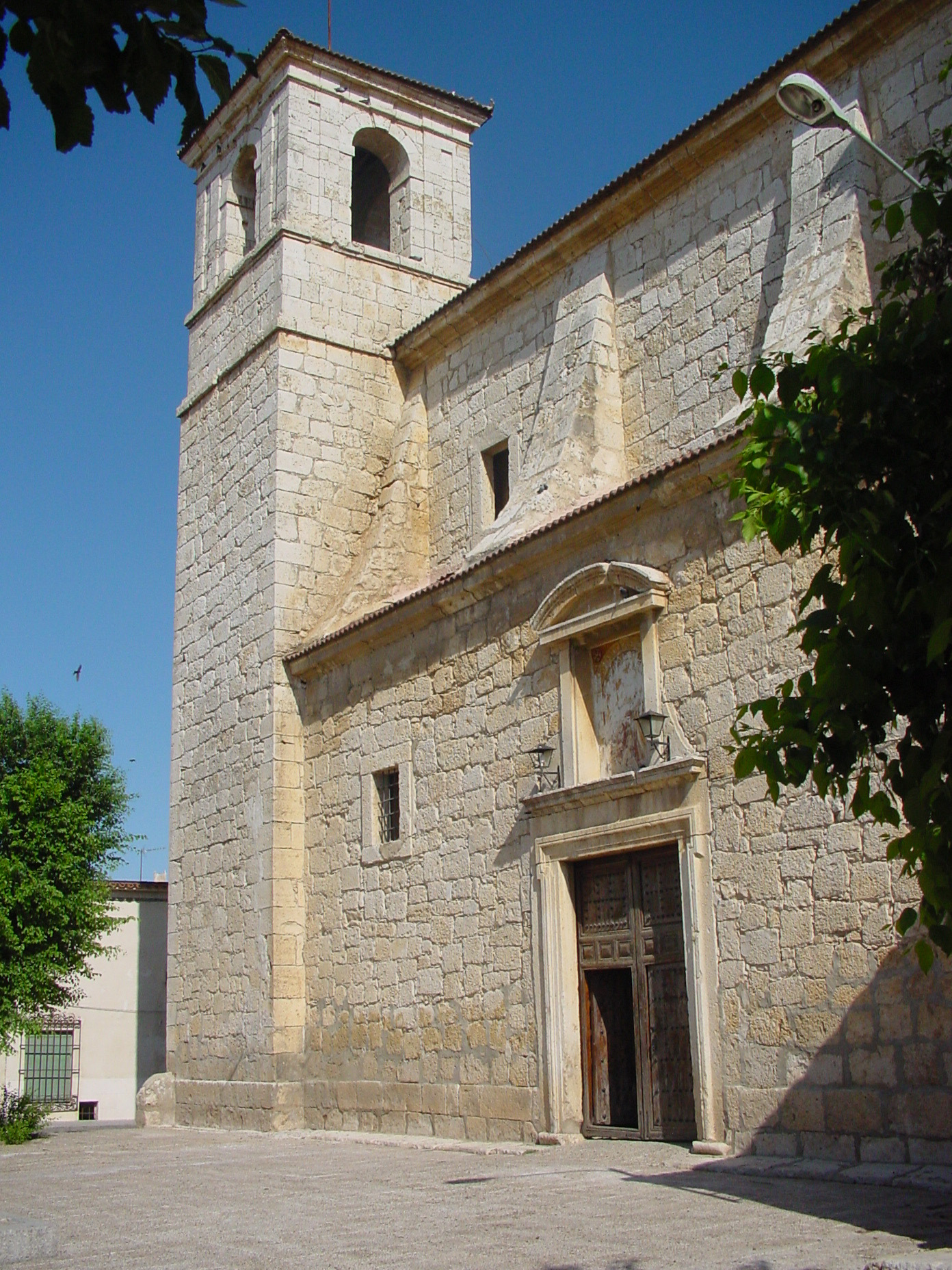 Vista de iglesia en Villaconejos.